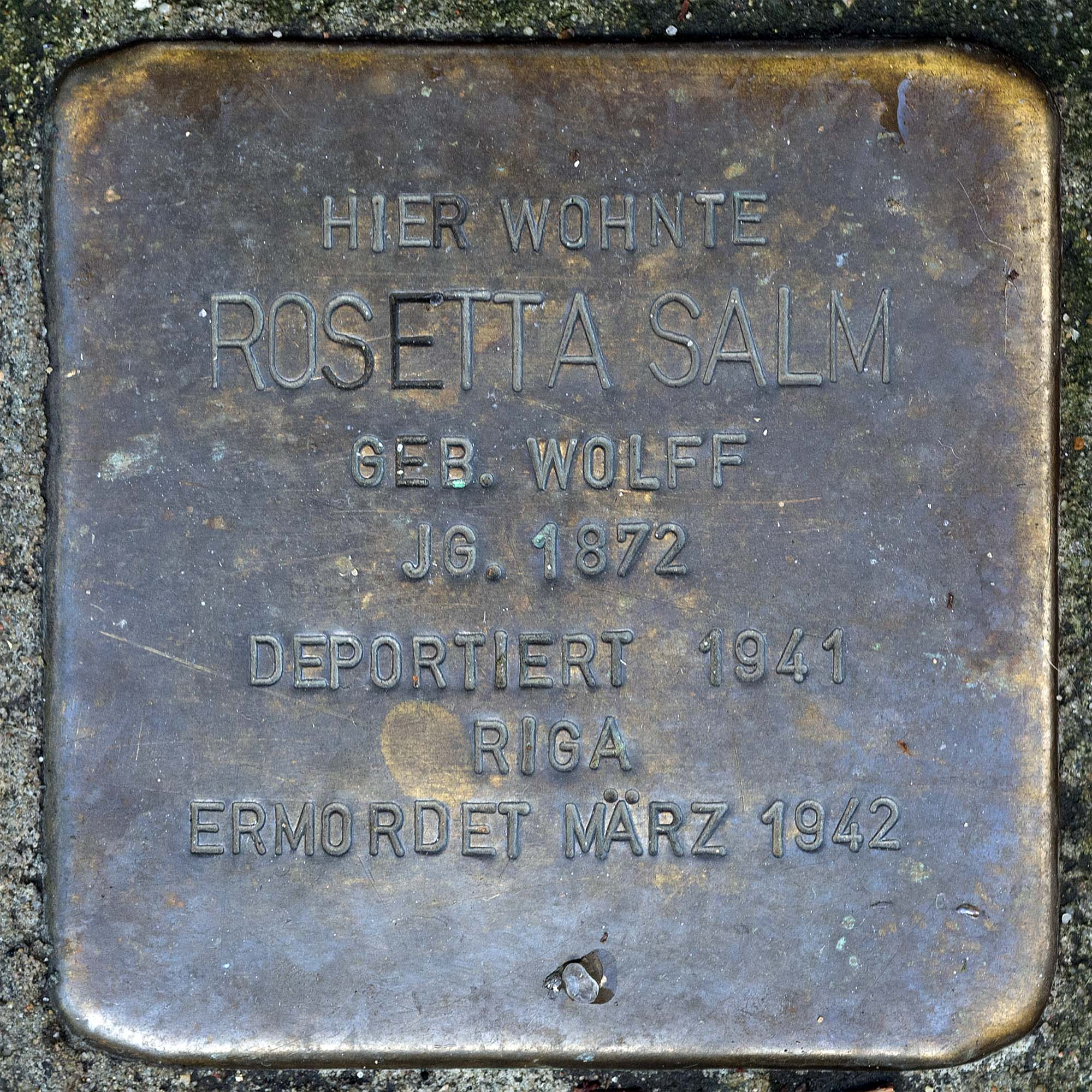 Stolperstein für Salm Rosetta